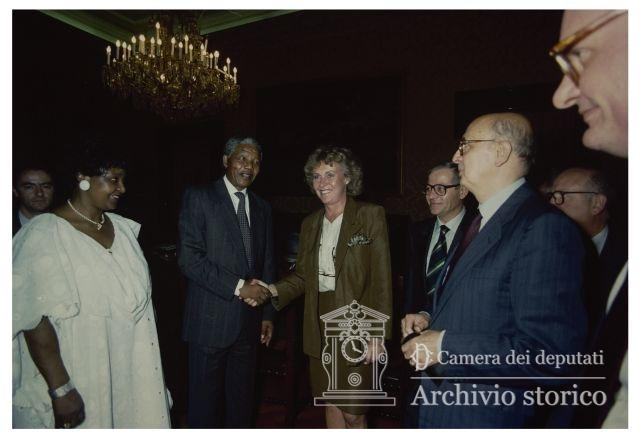 Il Presidente Iotti e il Presidente della commissione Esteri On. Margherita Boniver incontrano il leader del National Congress Nelson Mandela